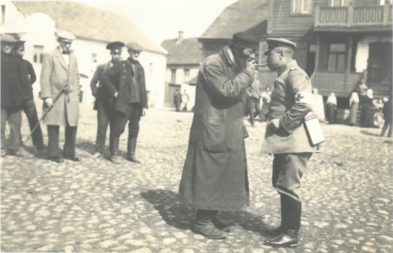 Беларуская (тарашкевіца): Крынкі (Krynki), пляц Рынак (plac Rynak)